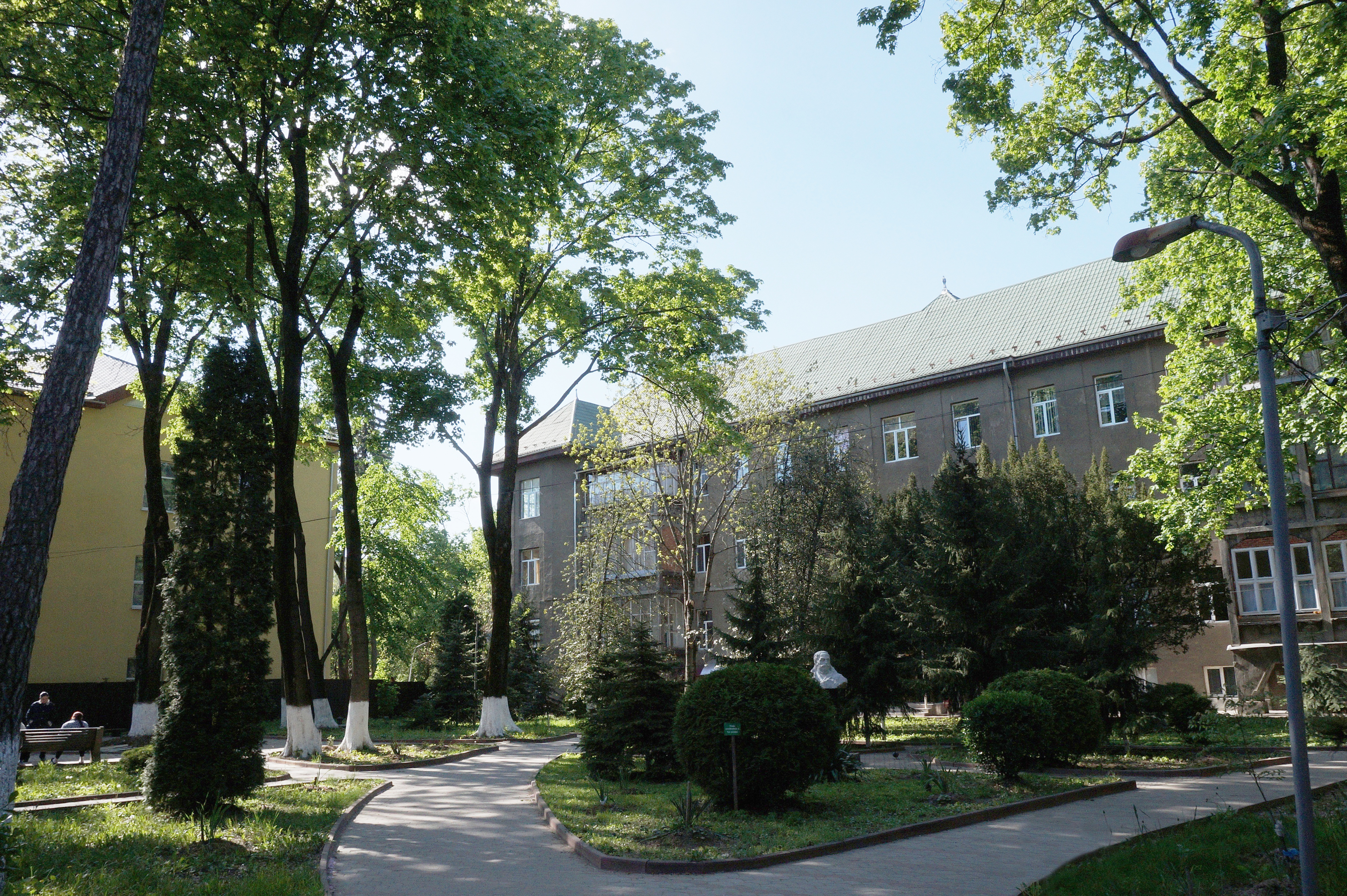 Ансамбль будинків обласної клінічної лікарні, Ужгород, вул. Капушанська, 22